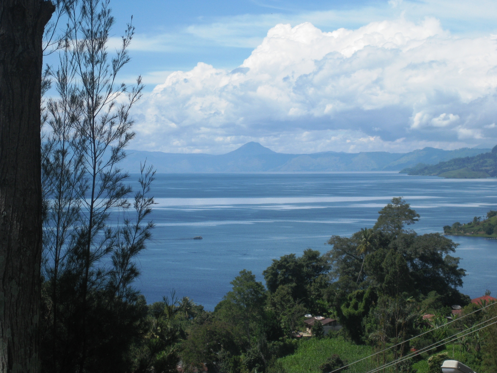 Lake Toba